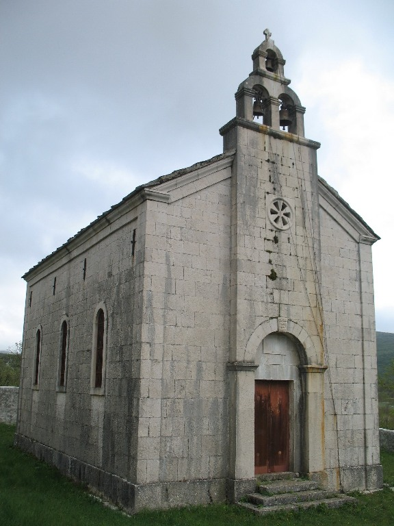 Црква Св. великомученика Лазара – Влаховићи